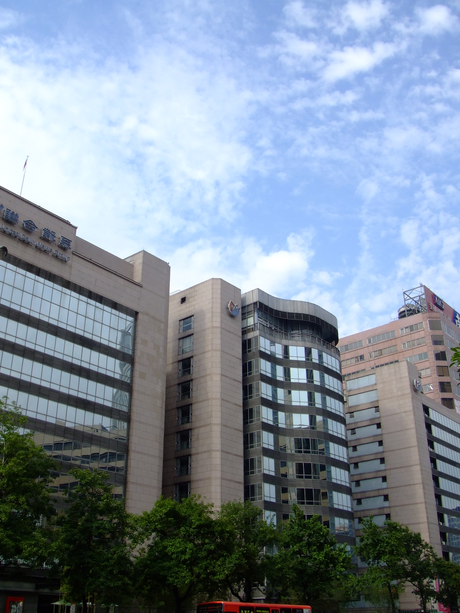 臺北市信義區忠孝東路四段，聯合報系總部大樓群，左起：聯合報第一大樓、聯合報第二大樓、聯合報第三大樓。三棟大樓均已拆除。